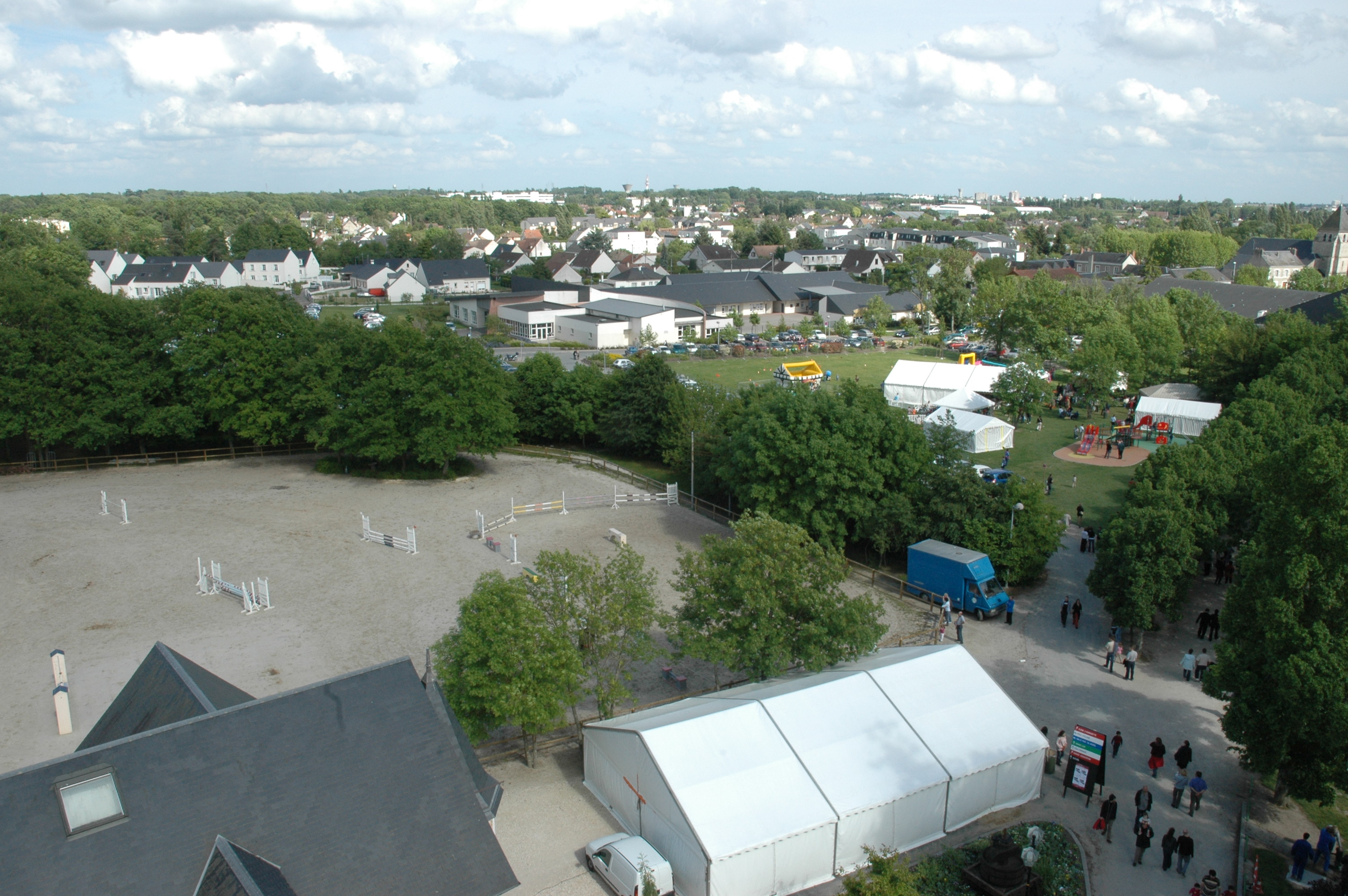 Photo prise en haut de la grande échelle des pompiers lors des Rencontres Saranaises 2006